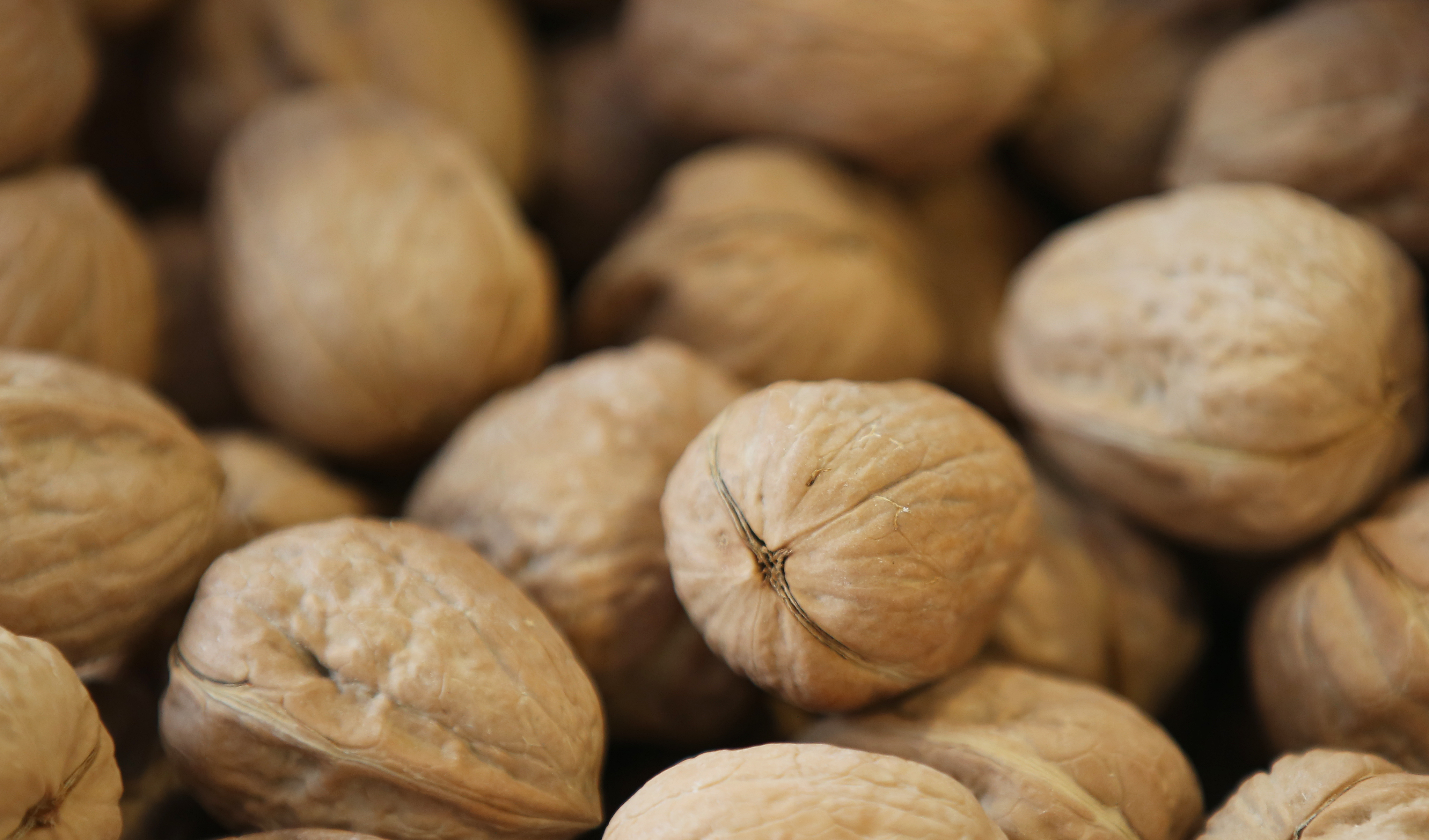 Walnut February 19, 2016 Toingin Market, Jongno-gu, Seoul Ministry of Culture, Sports and Tourism Korean Culture and Information Service ( Official Photographer : Jeon Han This official Republic of Korea photograph is being made available only for publication by news organizations and/or for personal printing by the subject(s) of the photograph. The photograph may not be manipulated in any way. Also, it may not be used in any type of commercial, advertisement, product or promotion that in any way suggests approval or endorsement from the government of the Republic of Korea. 정월대보름을 앞두고 통인시장에서 판매되고 있는 호두 2016-02-19 통인시장 문화체육관광부 해외문화홍보원 코리아넷 전한